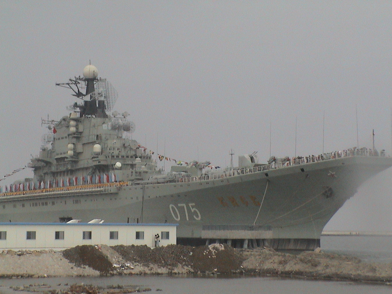 Der ehemalige sowjetische Flugdeckkreuzer Kiew in Tianjin, China, 2004.